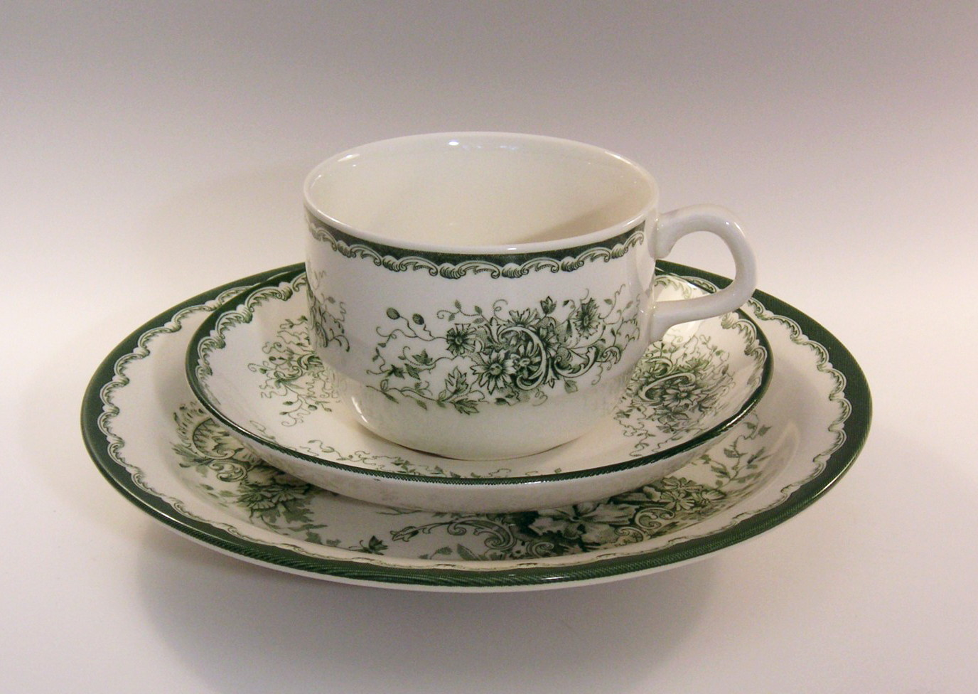 Porslinsserien "Gröna Anna"